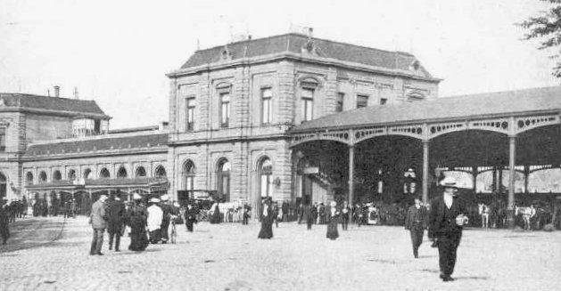 Station Rotterdam Deltse Poort